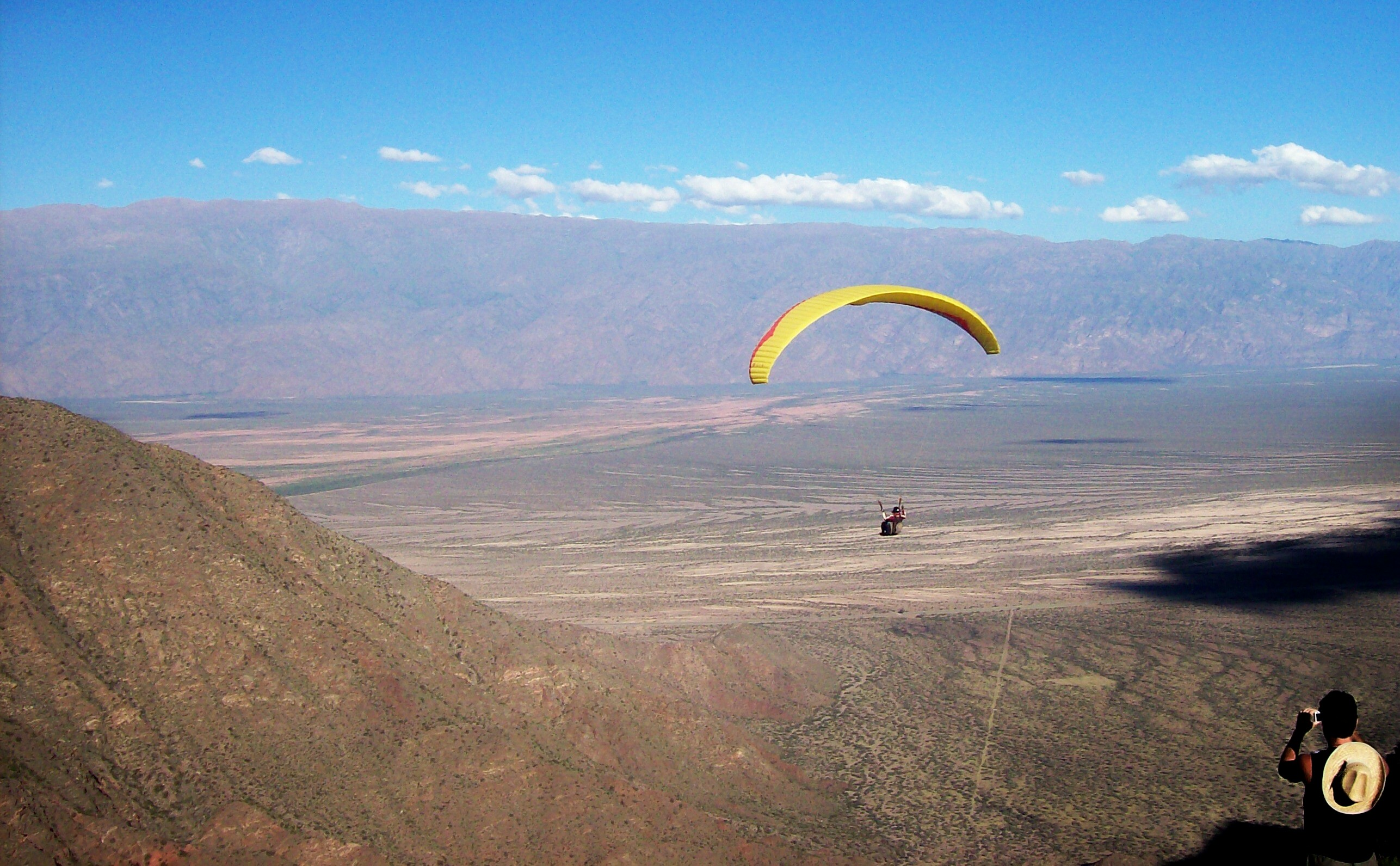 Competencia in ternacional de parapente (2008) cerca de la localidad de Famatina, en la provincia argentina de La Rioja. El lugar de vuelo está ubicado en una cadena intermedia, El Paimún, entre la Sierra del Velasco y el Cordón del Famatina.